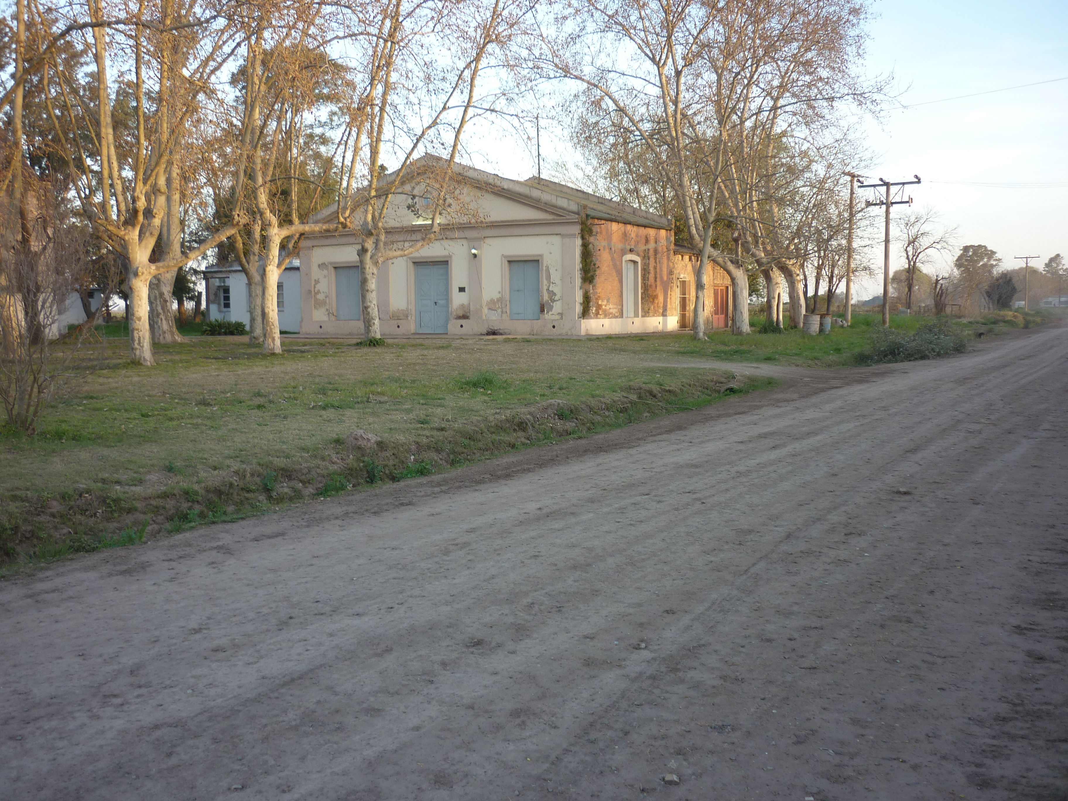 Primer Templo Evangélico Valdense de América Latina, ubicado en Colonia Belgrano